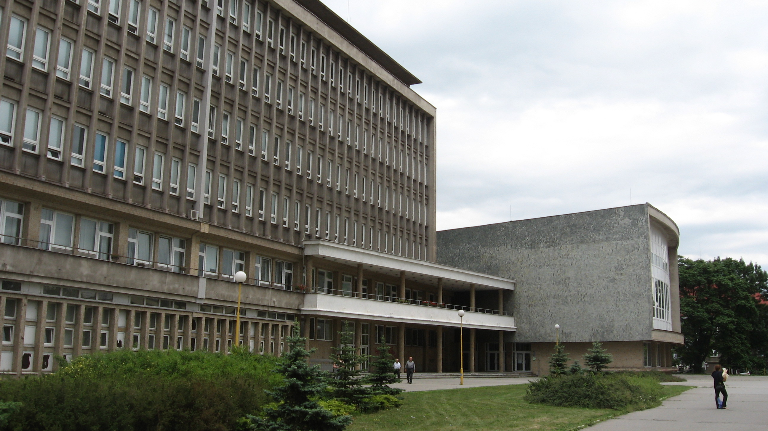 Hlavná budova spredu